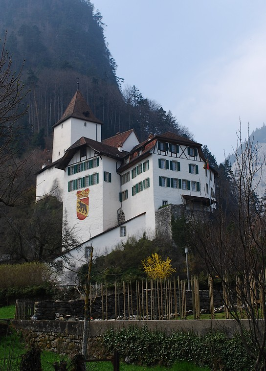 Vue du Château de Wimmis (en 2010)